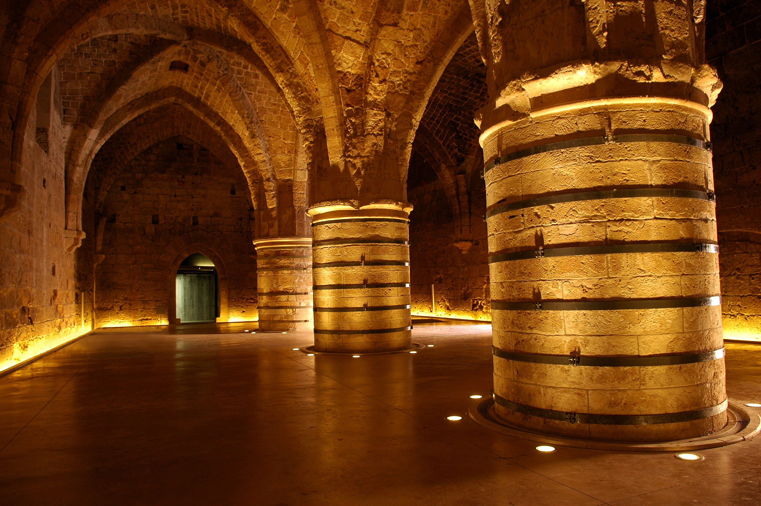 Johanniterkommende Akko: Refektorium im romanisch-gotischen ÜbergangsstilAcre - Akko 4- Crusaders' dining hall Acre